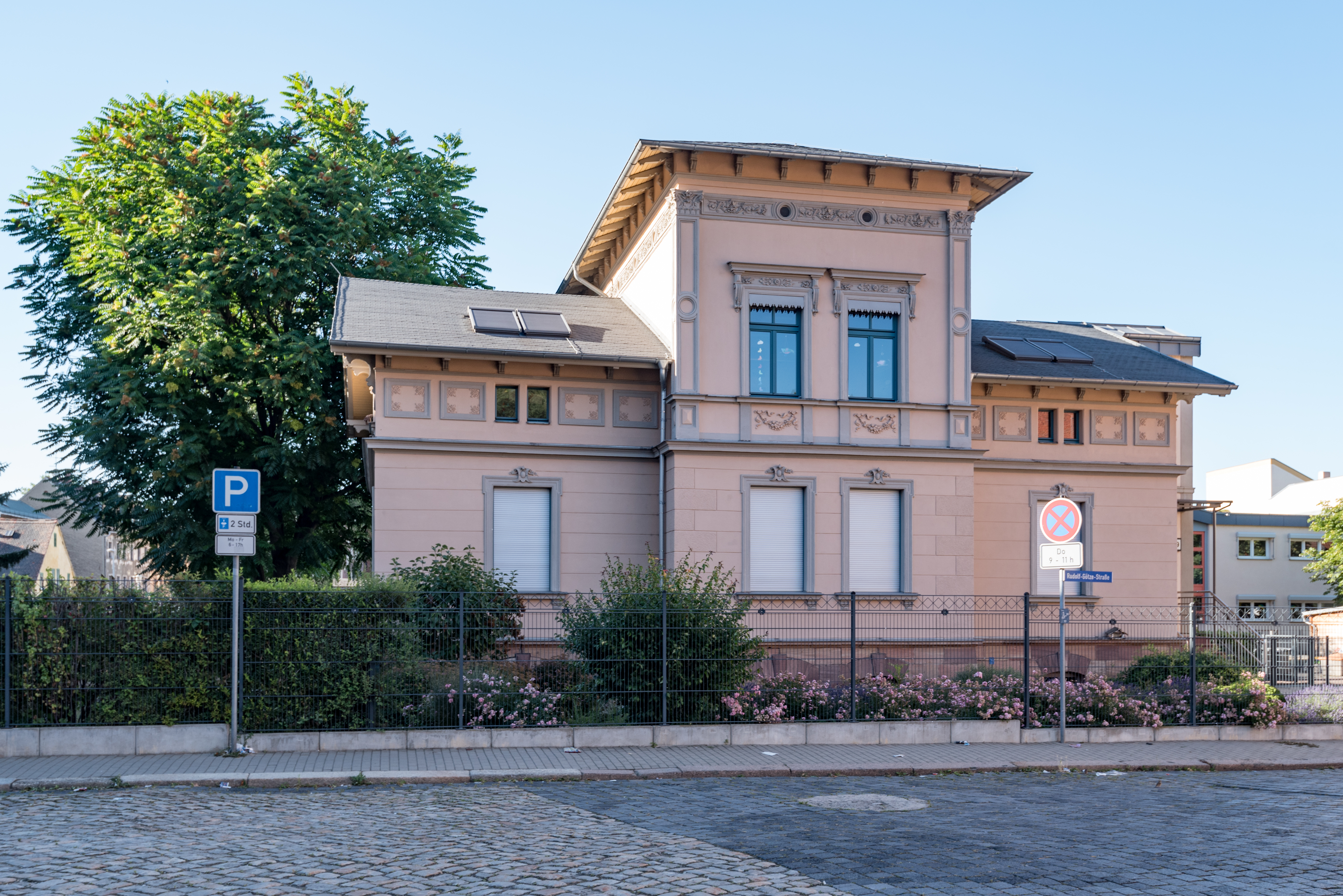 Weißenfels, Rudolf-Götze-Straße 19